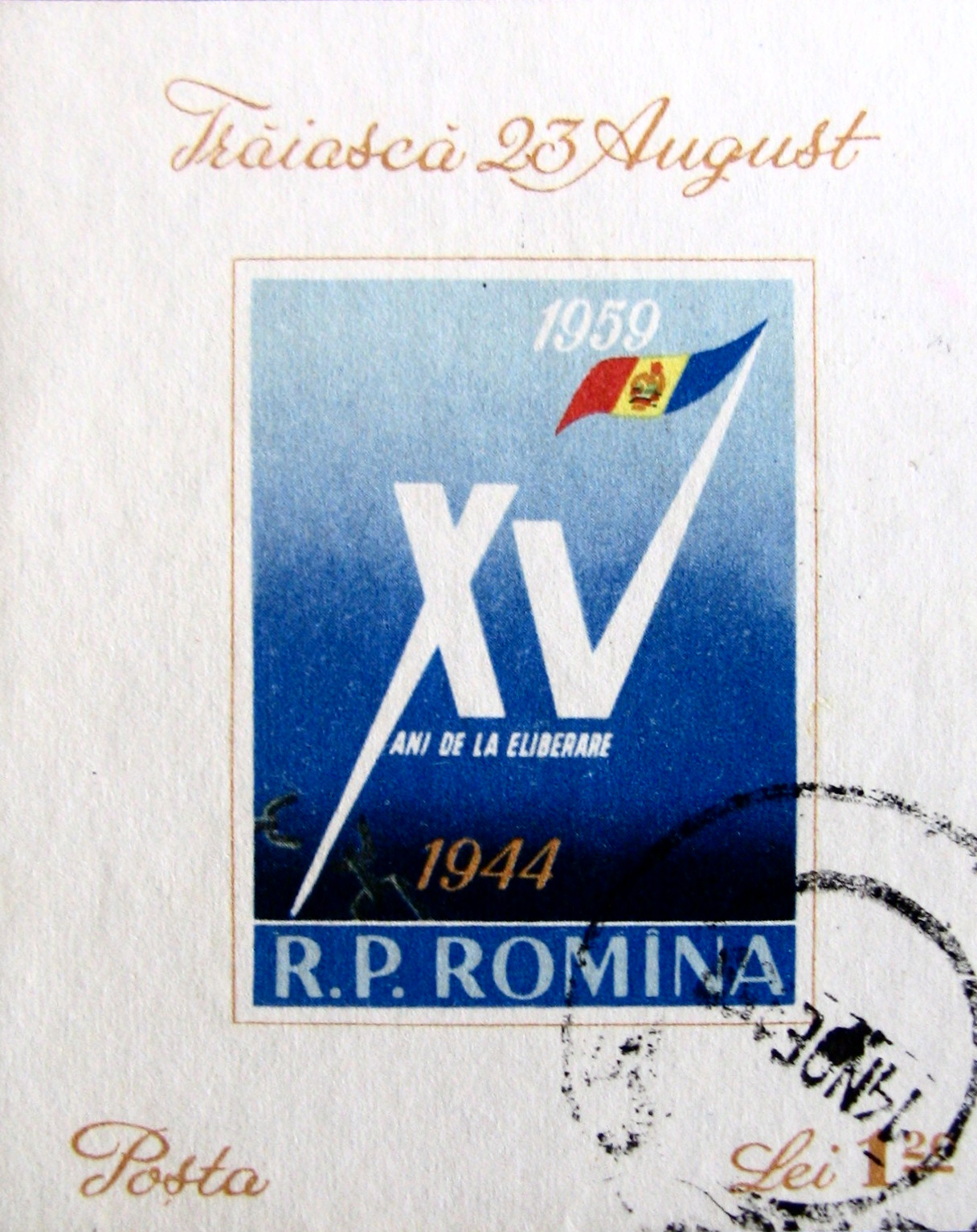 Source: Post of Romania